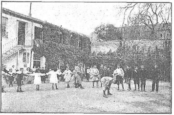 A la hora del recreo (Institución Libre de Enseñanza), obra del fotógrafo Christian Franzen, recogido en la revista Alma Española.